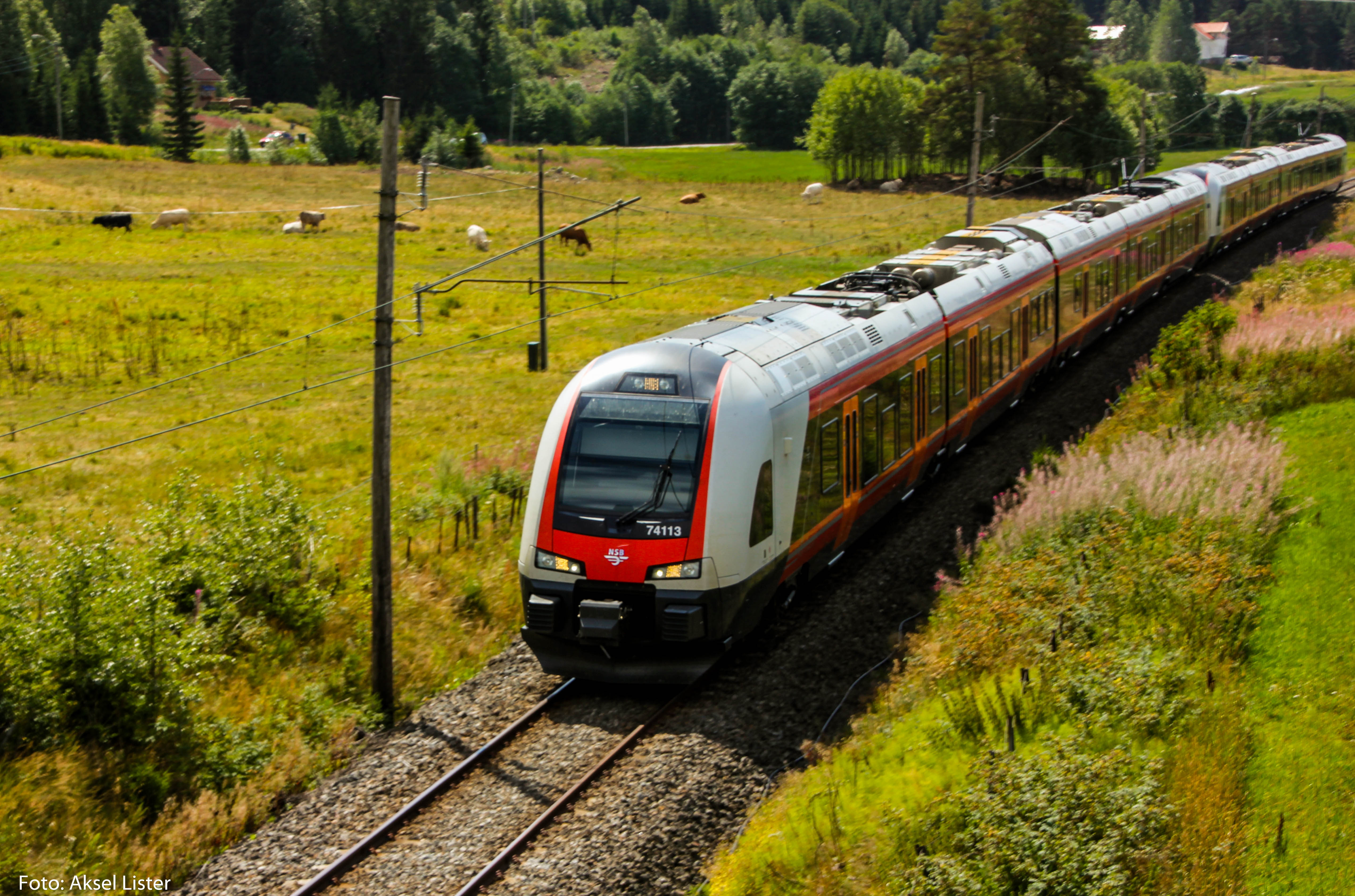 BM 74-13 igjennom Bjørkedalen, 22 juli 2018.